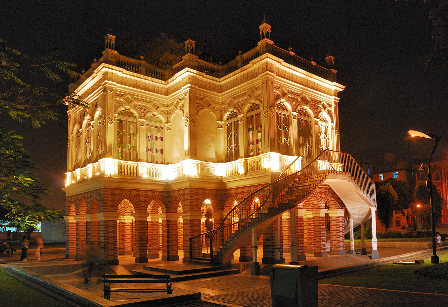 Pabellon Morisco